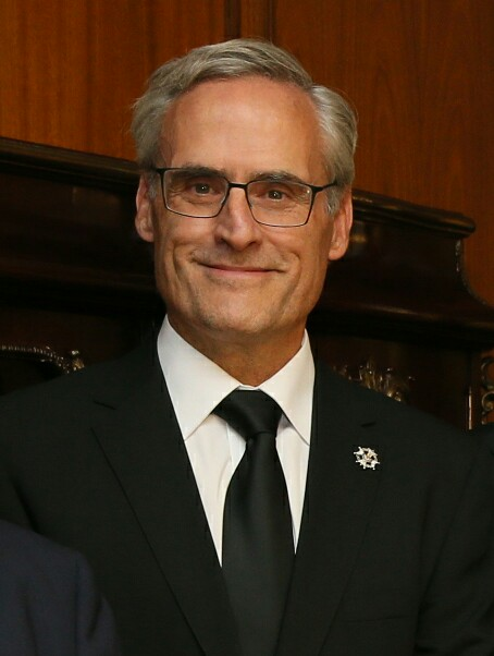 José Martínez Jiménez, fiscal superior de Castilla-La Mancha.